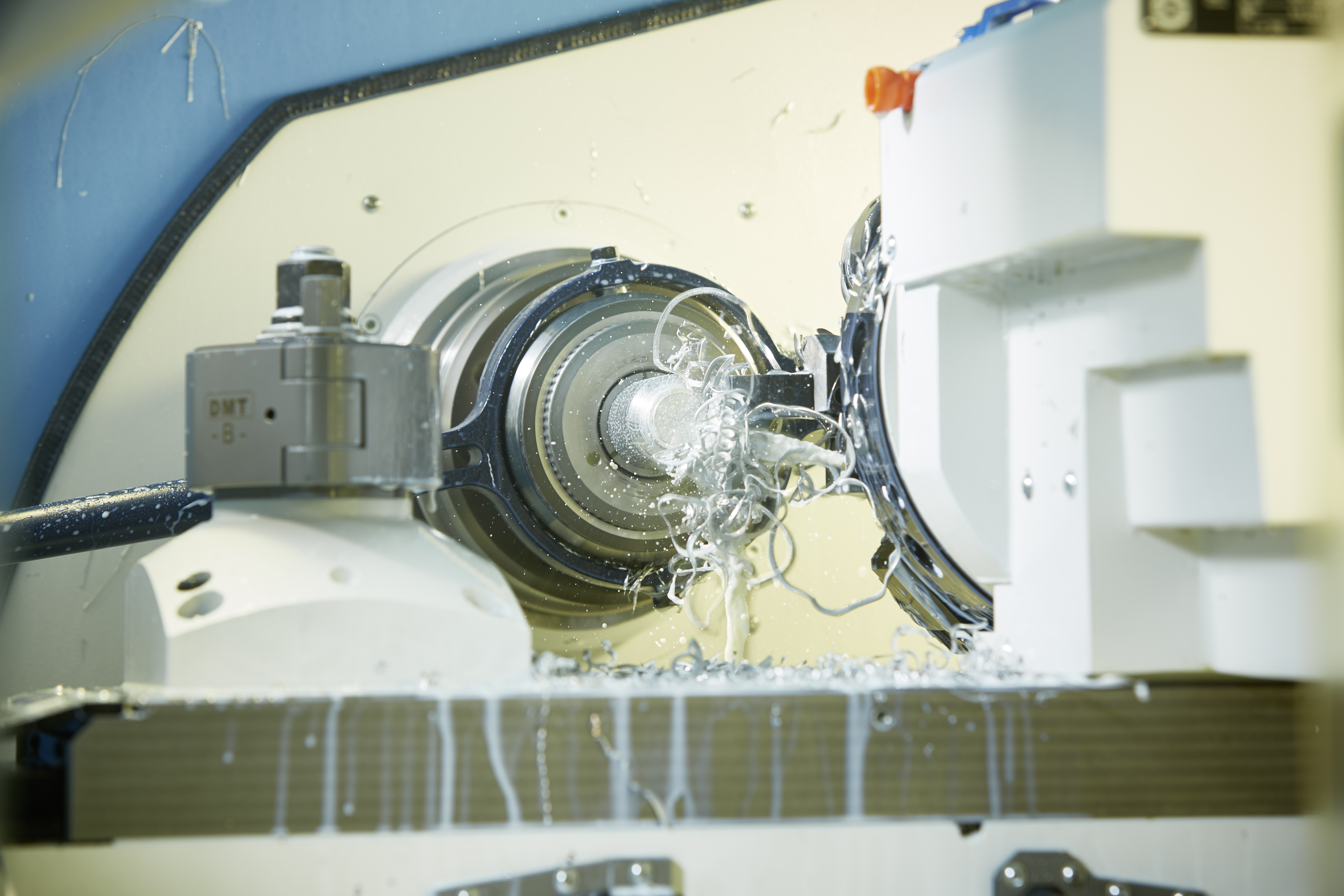 Spanen